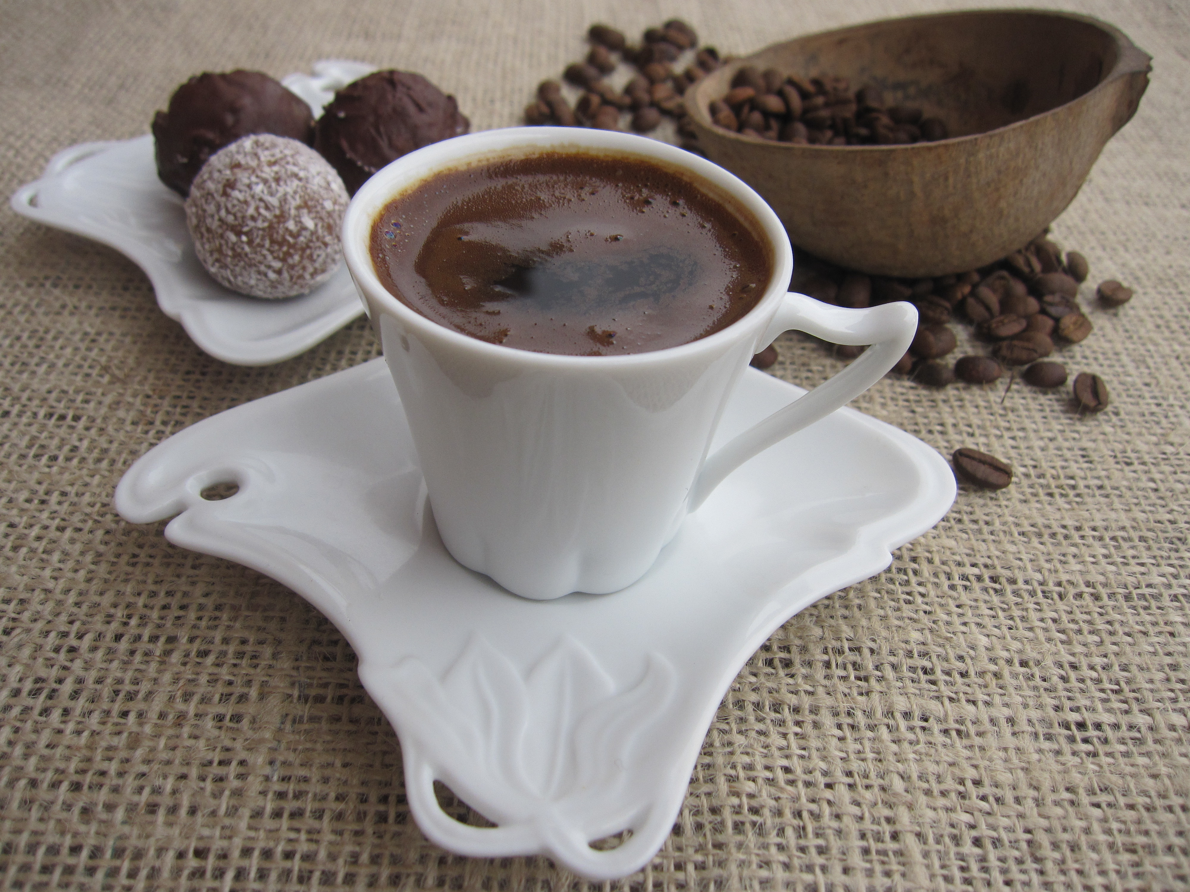 Pije e preferuar në Kosovë